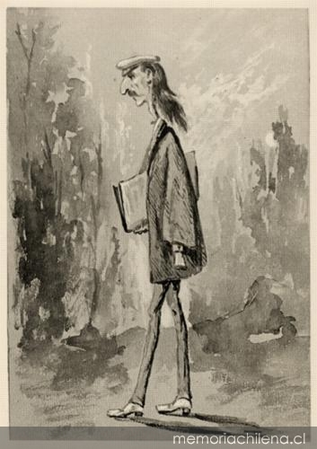 caricatura retrato de antonio smith